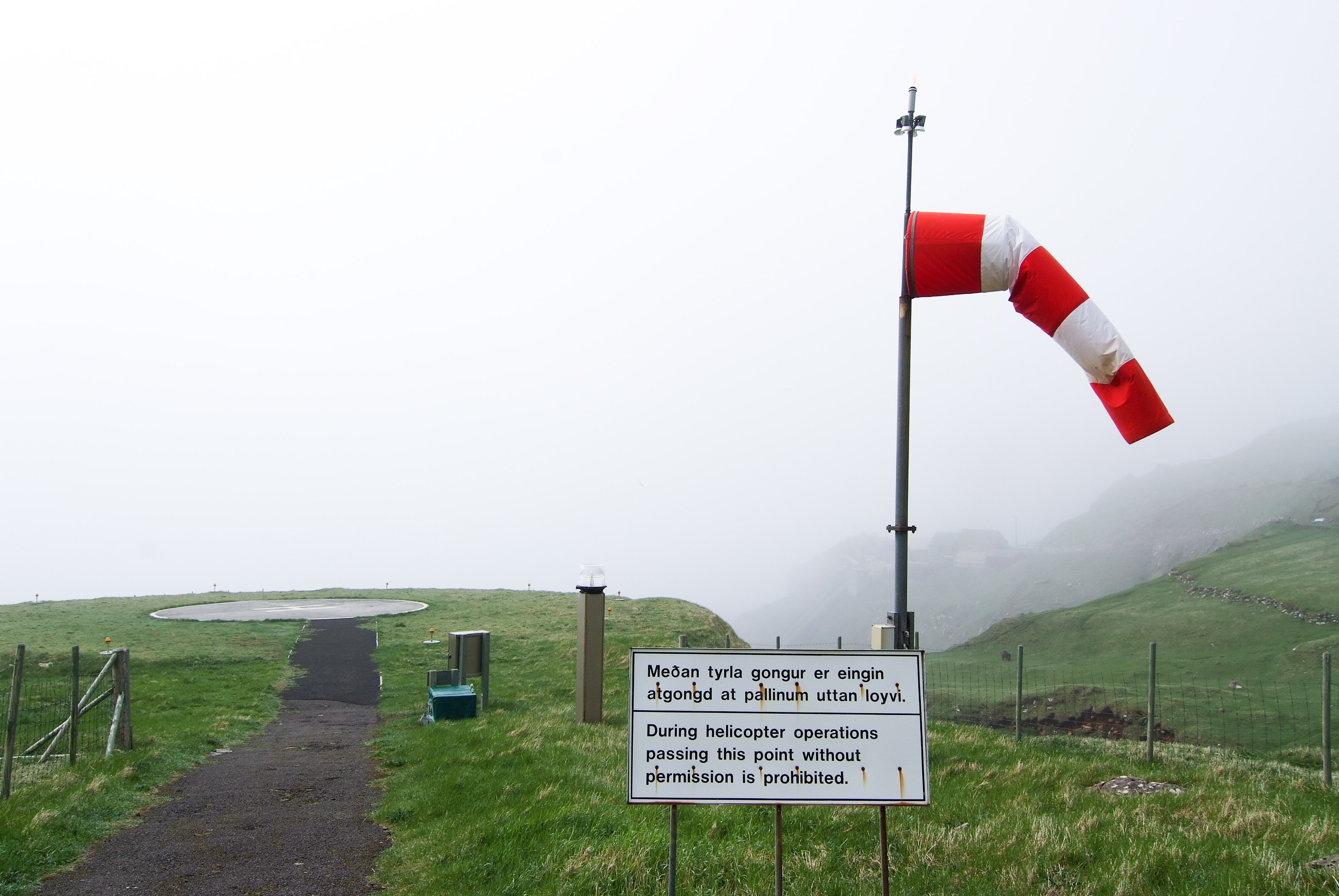 Mykines